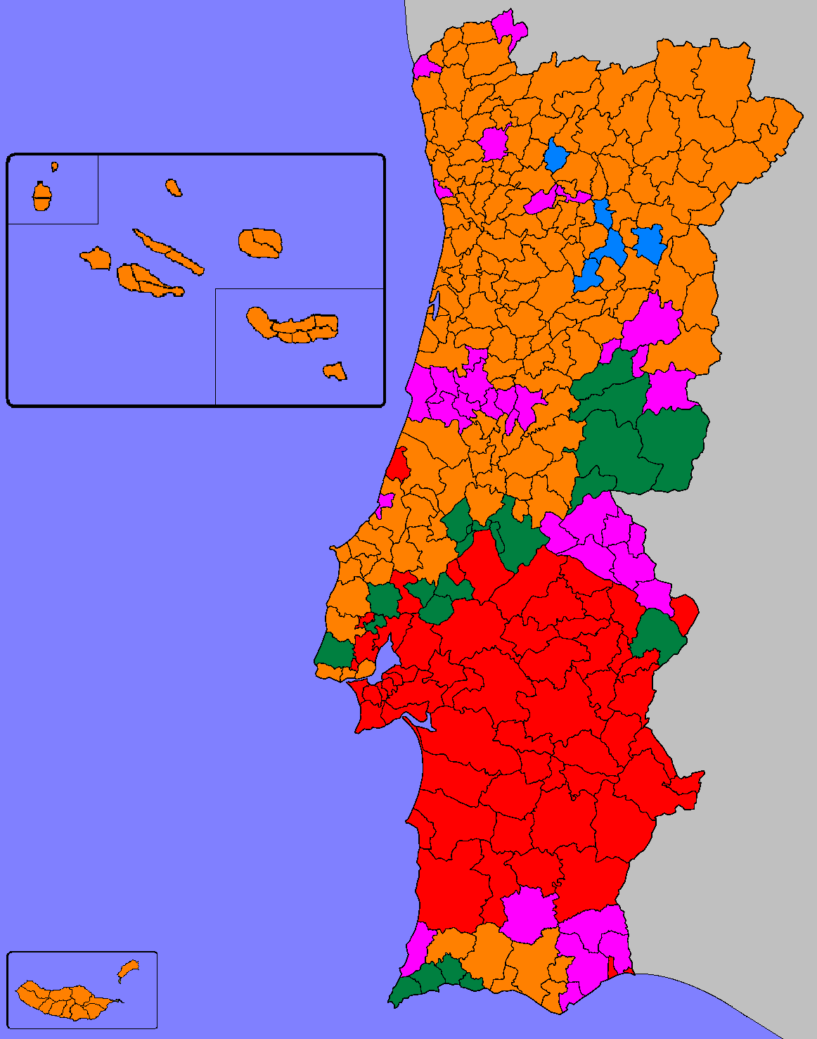 Mapa ilustrativo do partido mais votado por Concelho